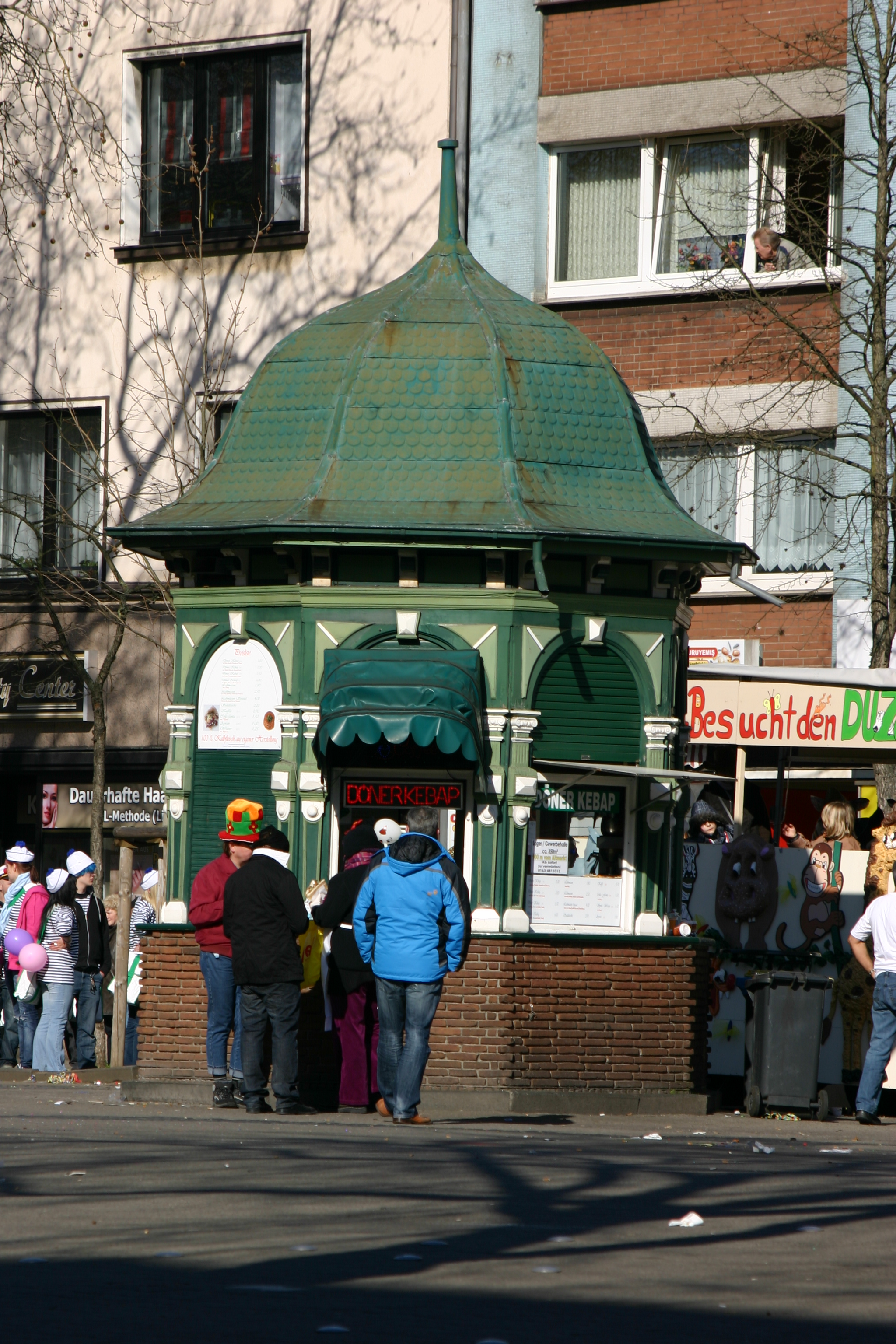 Holzpavillon auf dem Altmarkt in Duisburg-Hamborn; fotografiert am Tag des Kinderkarnevalszugs 2011. (Gebaut wurde der „Grüne Pavillon“ im Jahre 1890. Vermutlich handelt es sich um den ältesten Kiosk-Bau von Duisburg.)